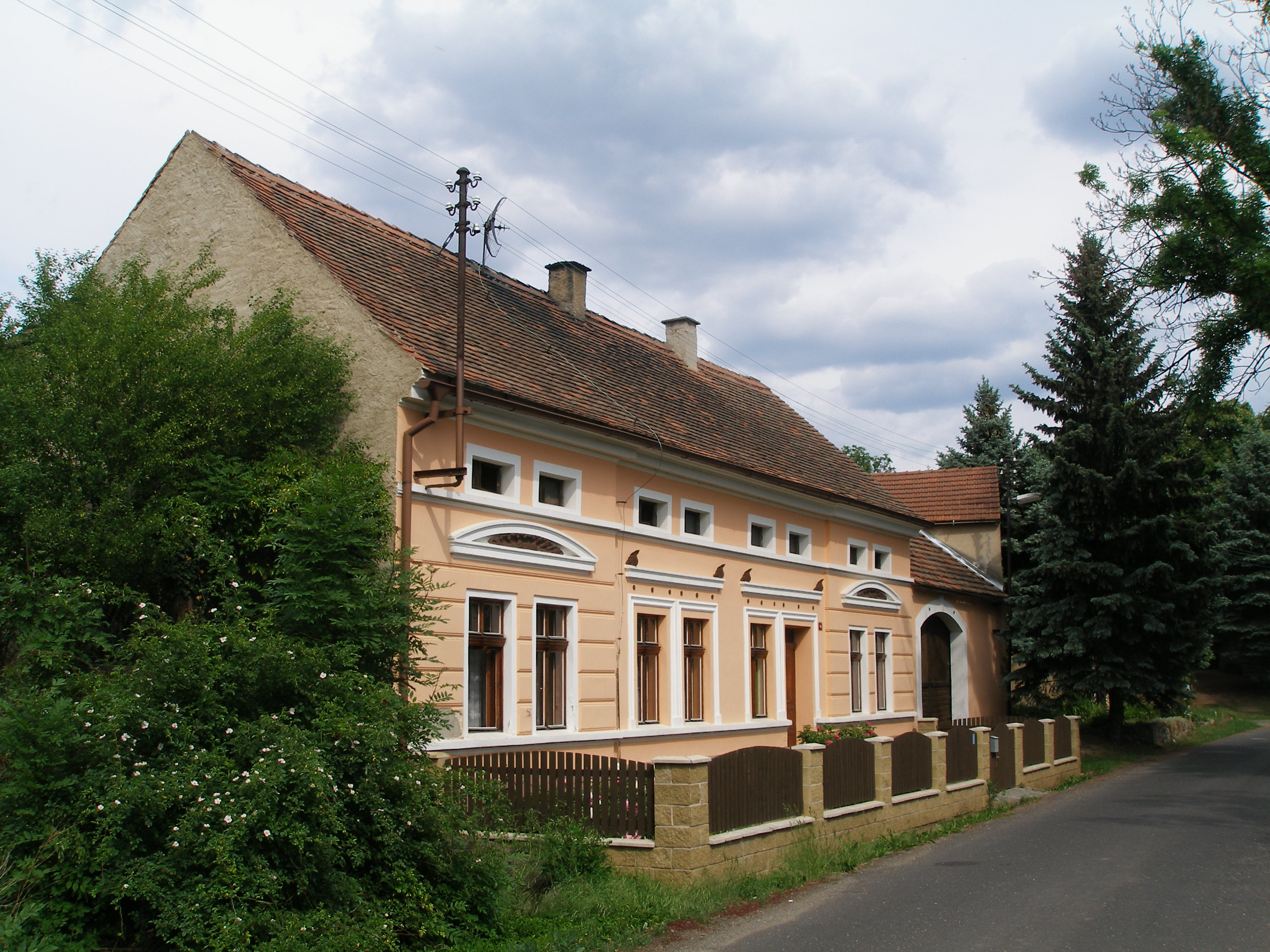 Dům ve Skůrech.